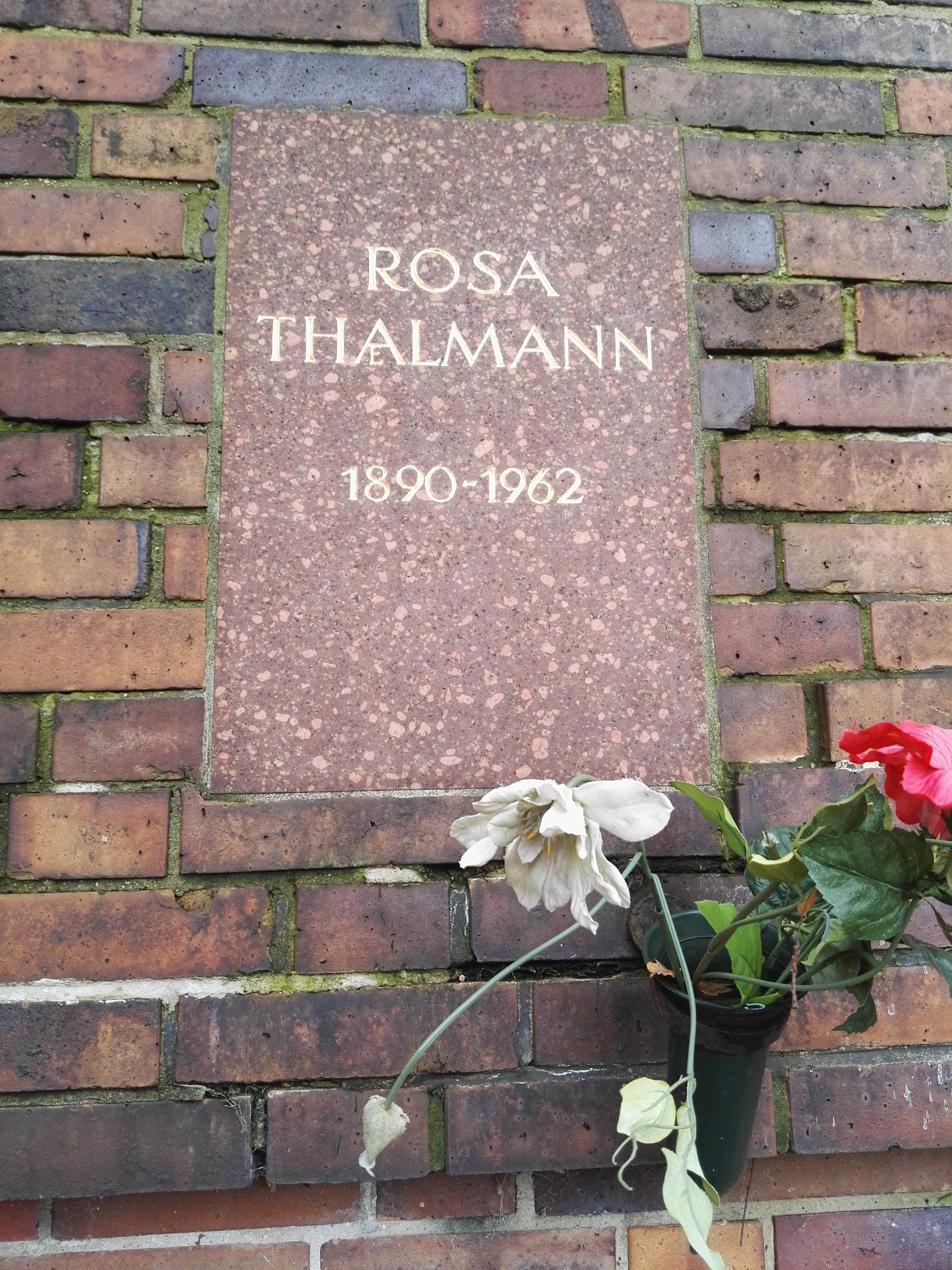 Grab von Rosa Thälmann in der Gedenkstätte der Sozialisten auf dem Zentralfriedhof Friedrichsfelde in Berlin-Lichtenberg